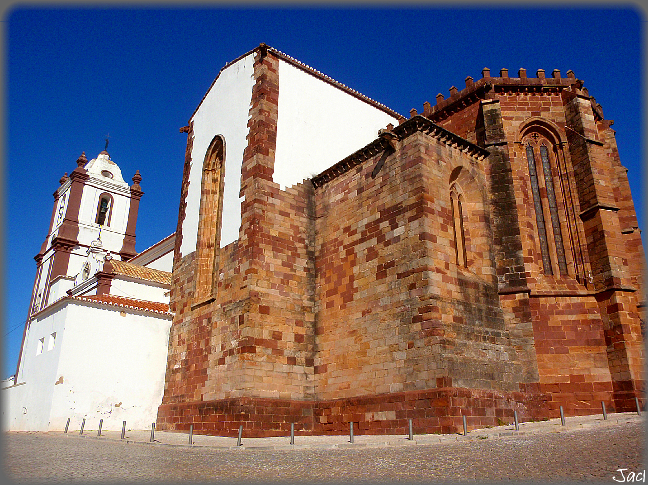 Silves es una localidad y un municipio de Portugal situado en el distrito de Faro, en el Algarve. La ciudad, de unos 10 800 habitantes, fue la antigua capital del Algarve. El municipio cuenta con 678,75 km² y 33.830 habitantes (2001), subdividido en 8 freguesías. Limita con los municipios de Loulé, Albufeira, Almodôvar, Lagoa, Portimão, Monchique, Odemira y el océano Atlántico. La historia de Silves se remonta a hace unos 3.000 años. Fue habitada por fenicios y cartagineses, y más tarde conquistada por los romanos. Recientemente, arqueólogos alemanes de la universidad de Jena han descubierto en un campo cerca de la localidad los restos de los muros de una villa romana. Se han hallado restos de cerámica y mosaico, el perfil de un edificio de tres alas, restos de los muros exteriores masivos, que rodeaban los muros interiores del edificio. Asimismo aseguran haber encontrado broches de bronce, restos de frescos murales, miles de teselas de mosaico y monedas con la efigie del emperador Constantino y ánforas. Tras la conquista musulmana se convirtió en la capital de la región del Algarve, recibiendo el nombre de Silb durante el dominio musulmán. En 1189 fue conquistada por Sancho I, que la perdió ante los almohades hacia 1191 Silves is a municipality in the Portuguese Algarve of southern Portugal. The population in 2011 was 37,126,[2] in an area of 680.06 km². The urbanized area includes approximately 11,000 inhabitants. Silves is the former capital of the Algarve and is of great historical importance